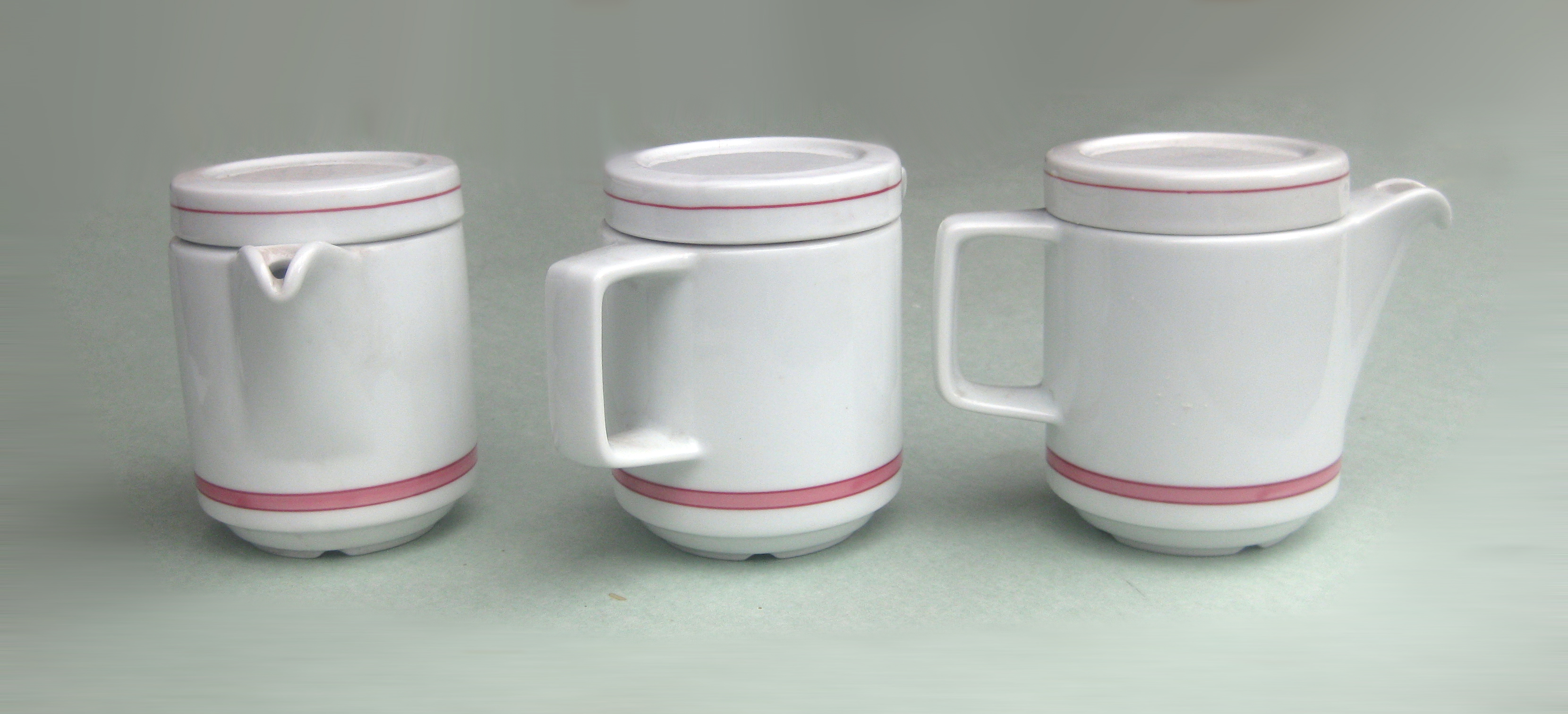 Kaffeekännchen mit fallgesichertem Deckel aus der Gastronomiegeschirr-Serie "rationell", 1969-70. Design: Margarethe Jahny für Colditz Porzellan